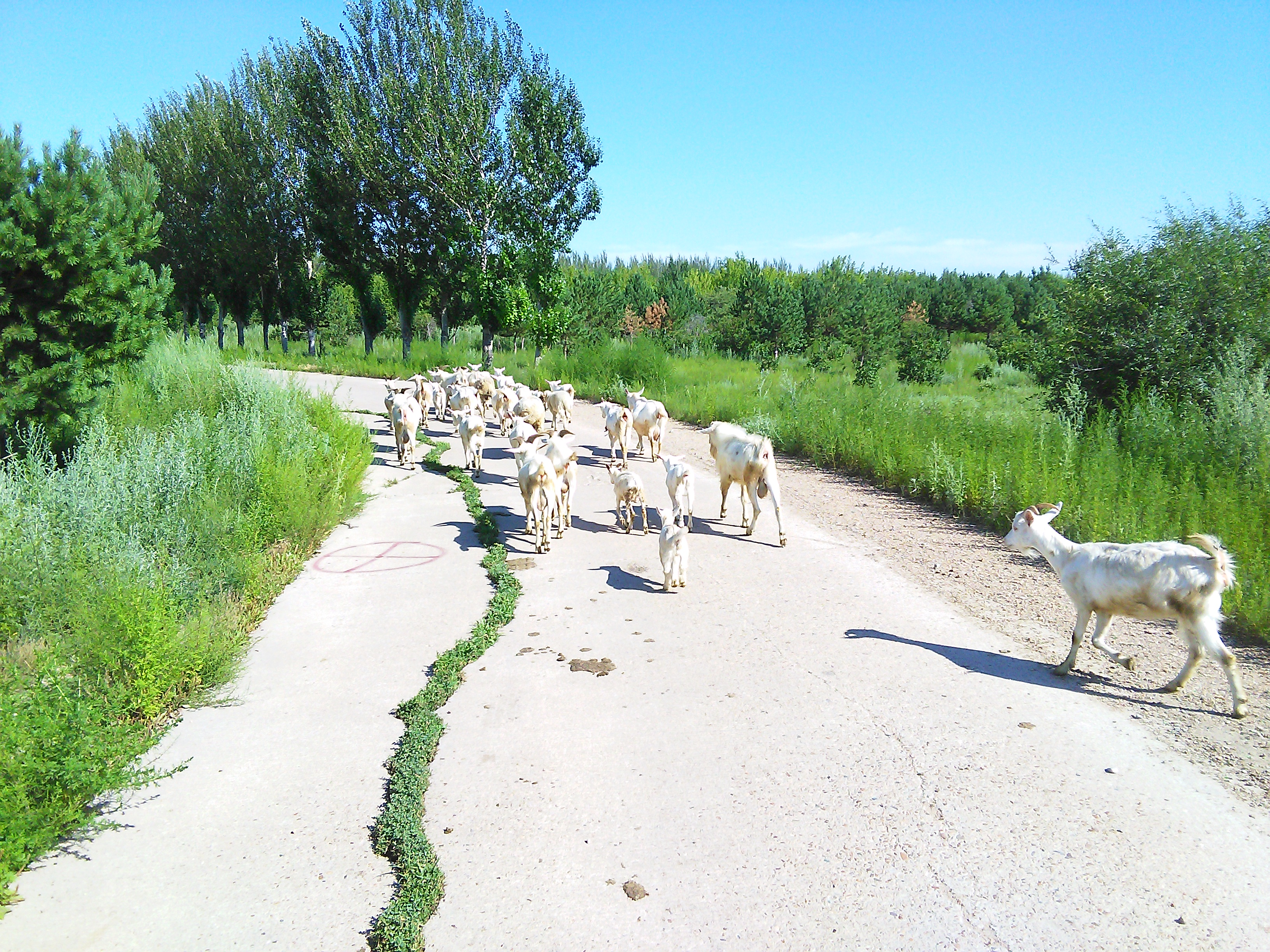 前罕伯岱村-羊群-2017